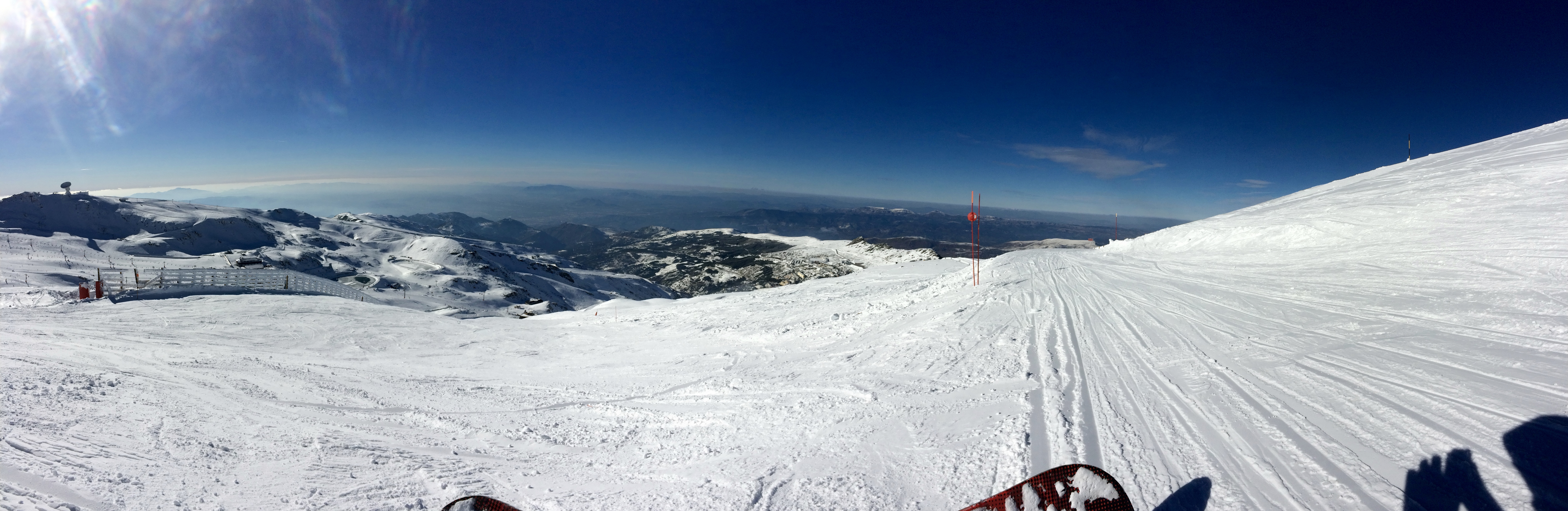 Panorámica en la Estación de Esqui de Sierra Nevada en Febrero de 2016